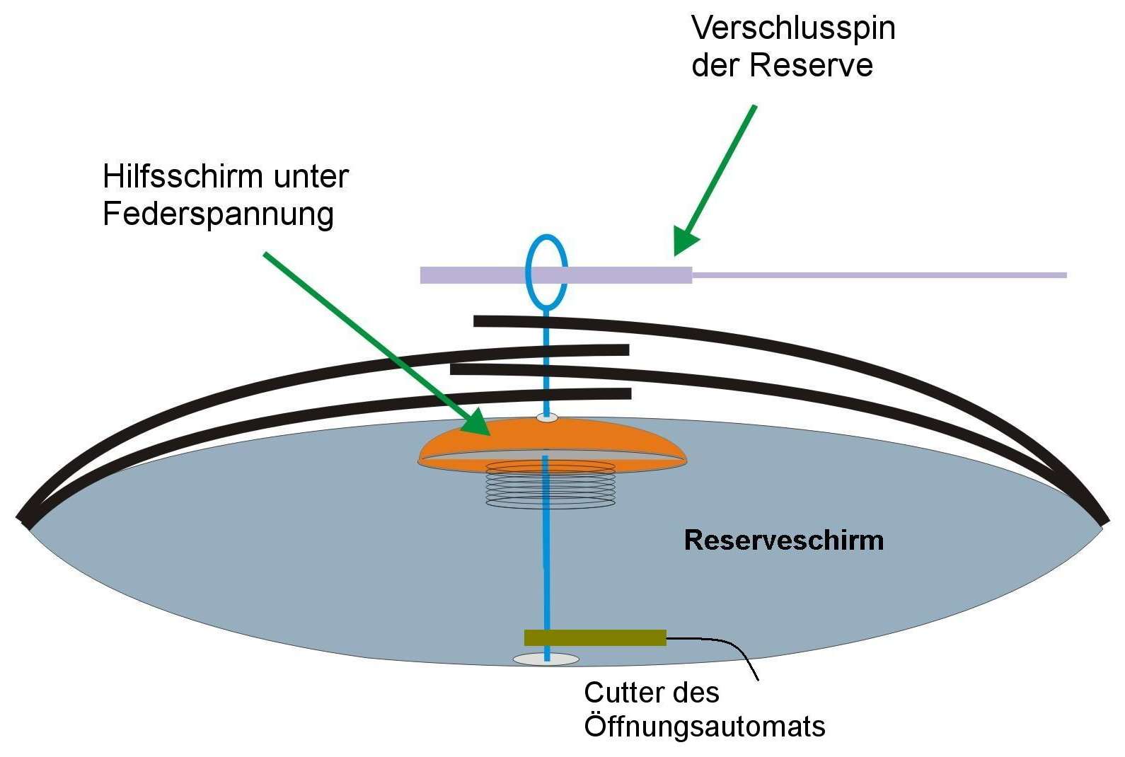 Noch verschlossener Reservecontainer. Reservefallschirm mit am Boden montiertem Cutter. Reservefallschirm.